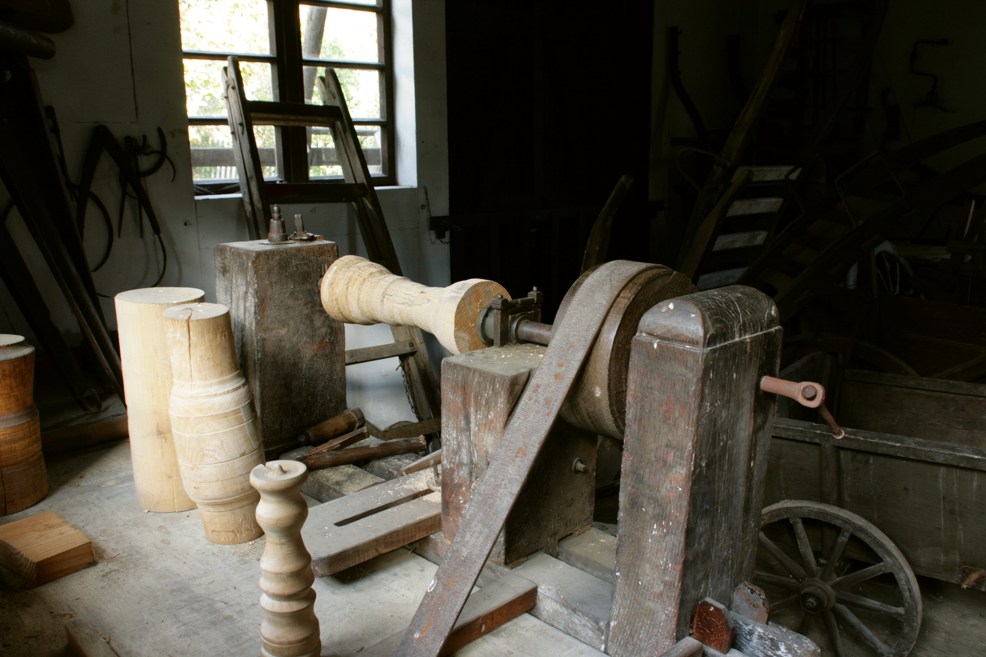 Stellmacherei aus Eikamp, Odenthal, im Bergischen Museum für Bergbau, Handwerk und Gewerbe, Burggraben 9-21 in Bergisch Gladbach